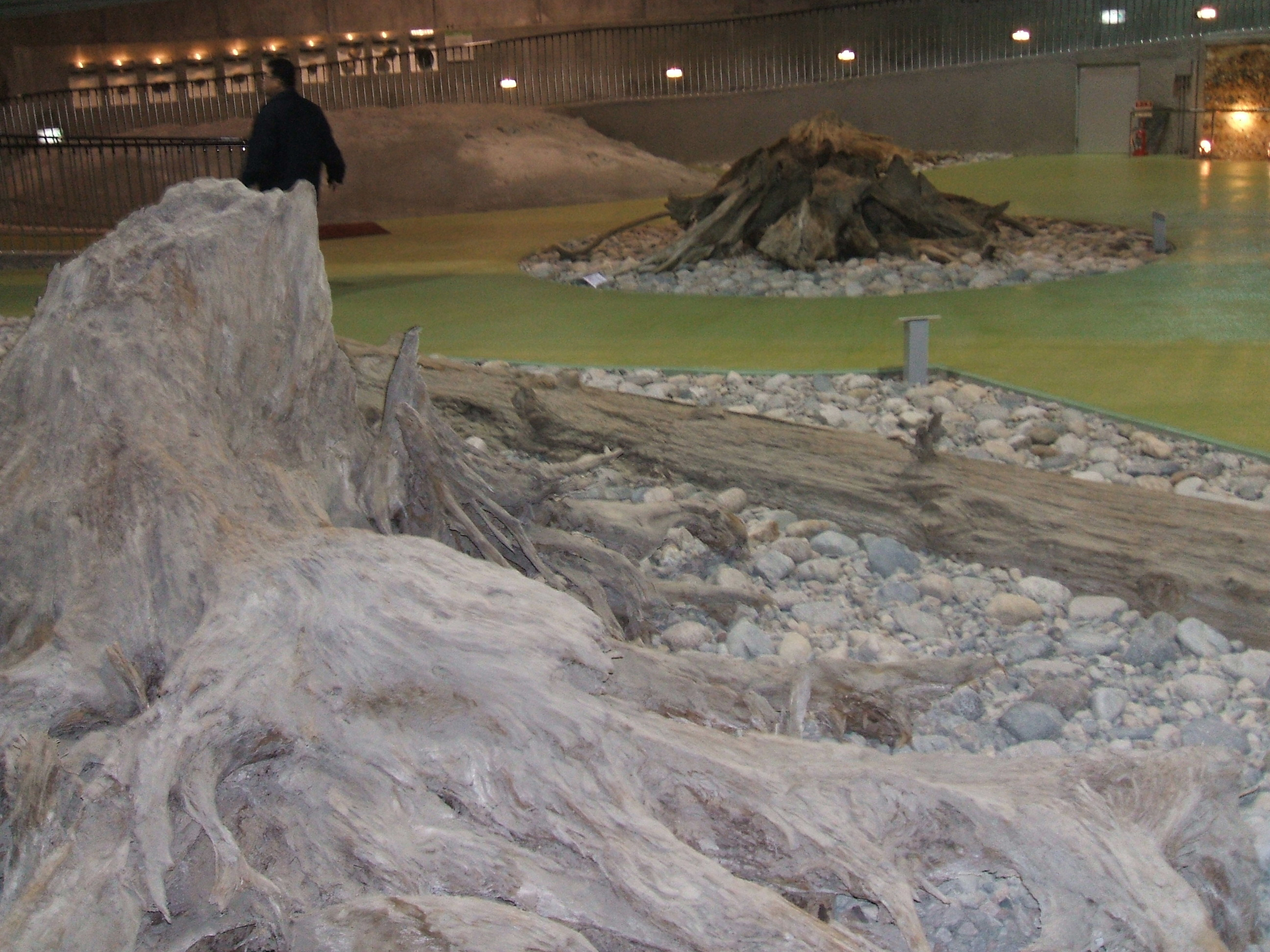 富山県魚津市にある[魚津埋没林博物館]の展示埋没林